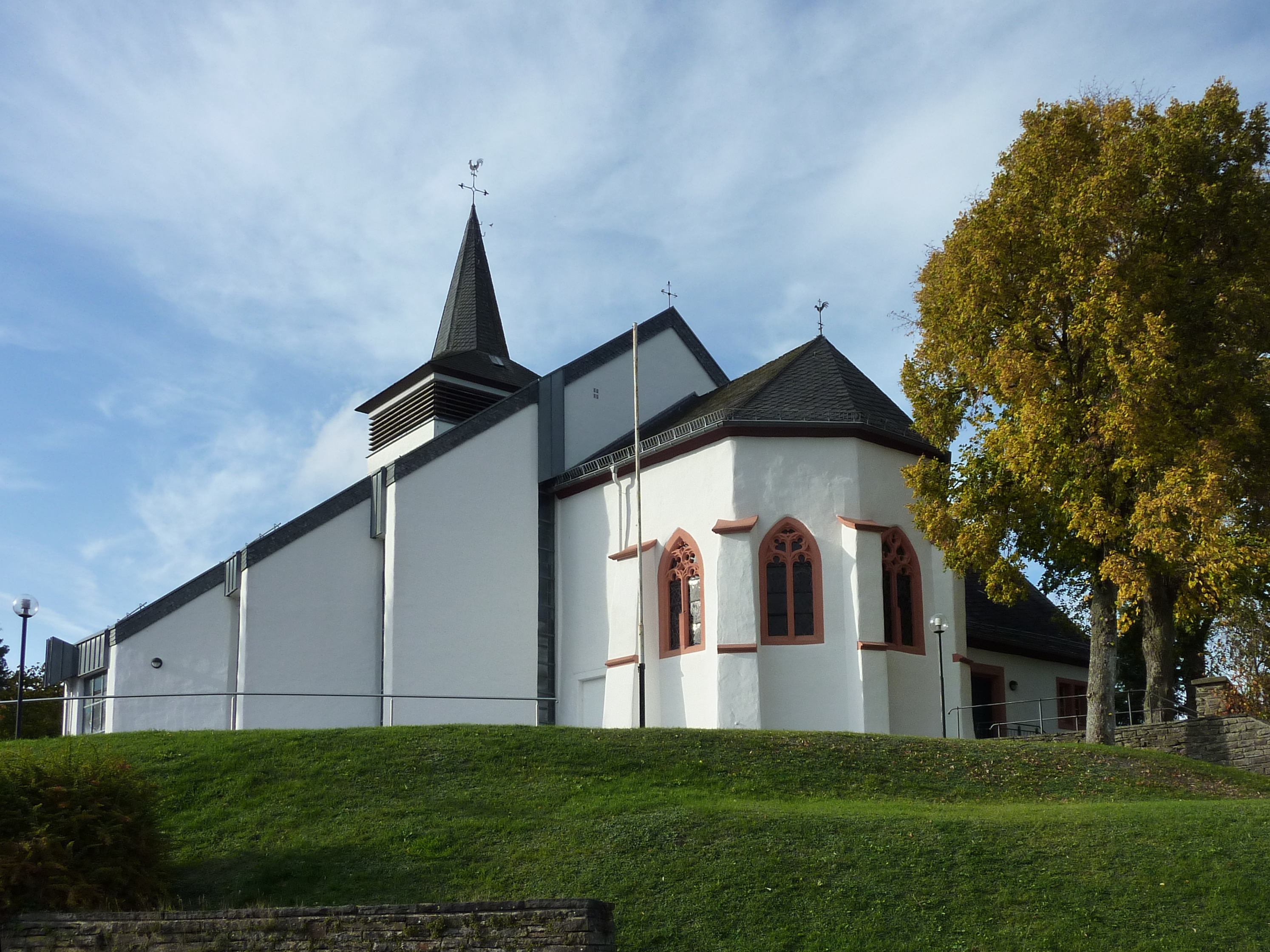 Berk, Schleidener Str. 9, Kath. Pfarrkirche, von O